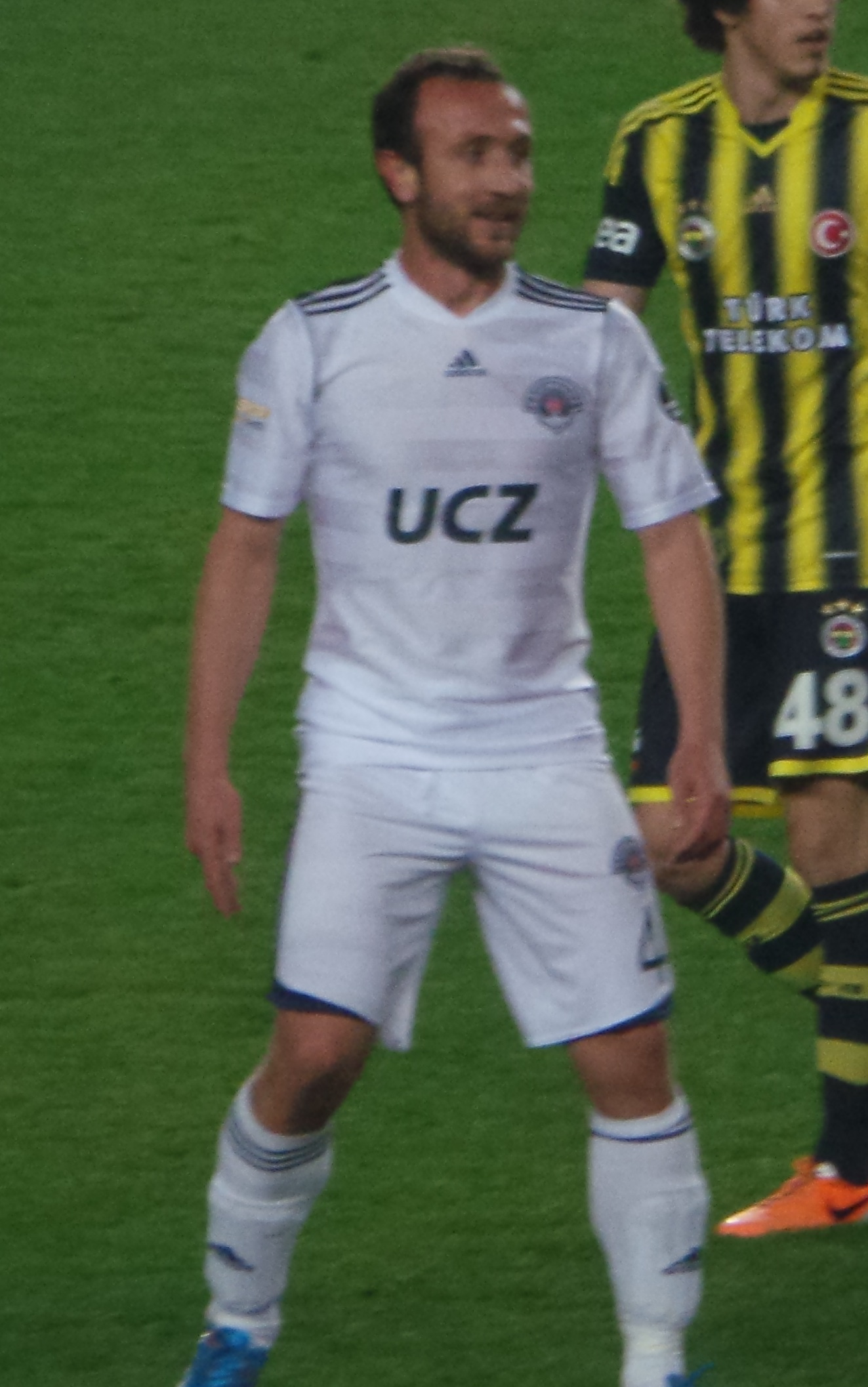 İlhan eker